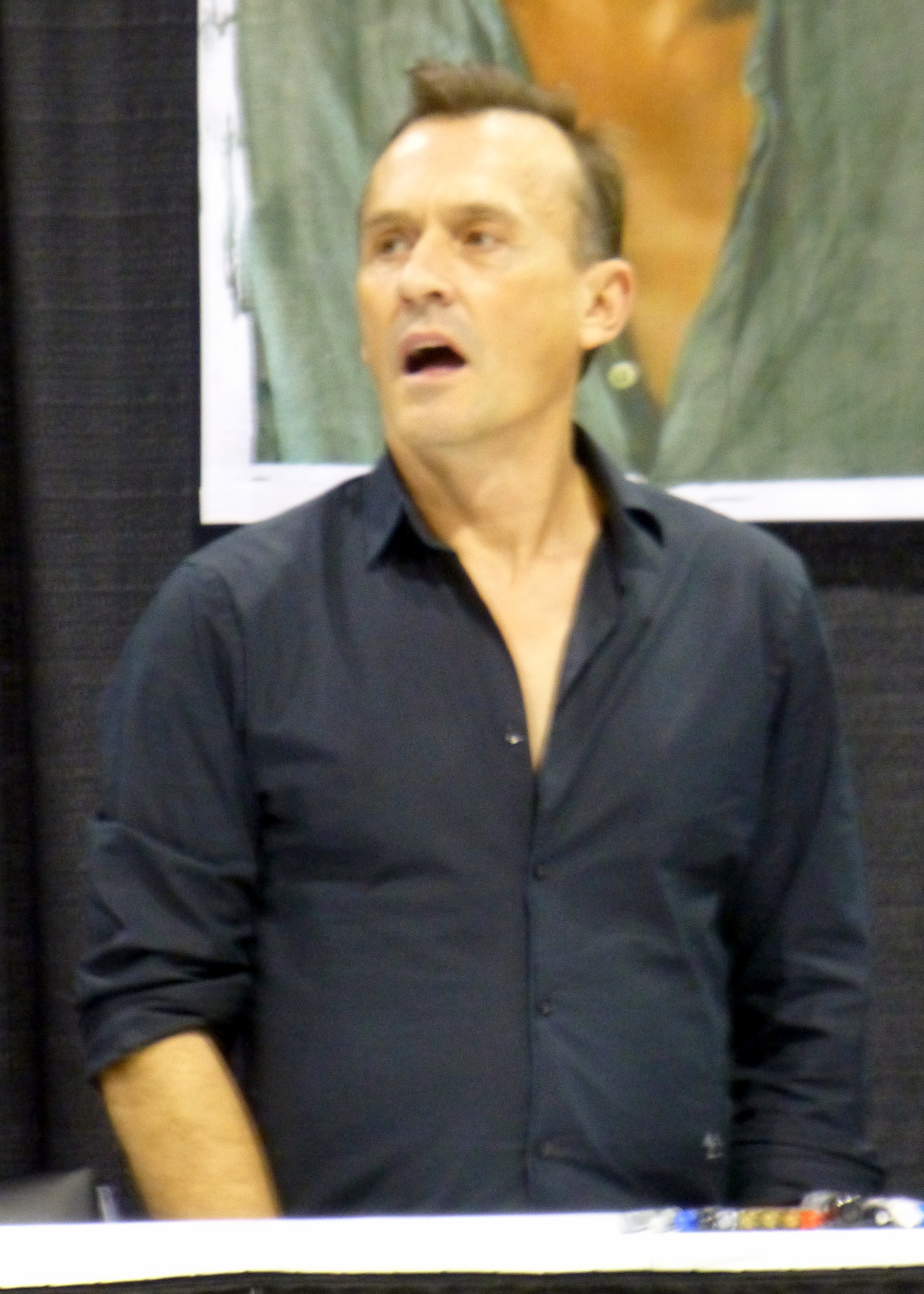 Robert Knepper 02